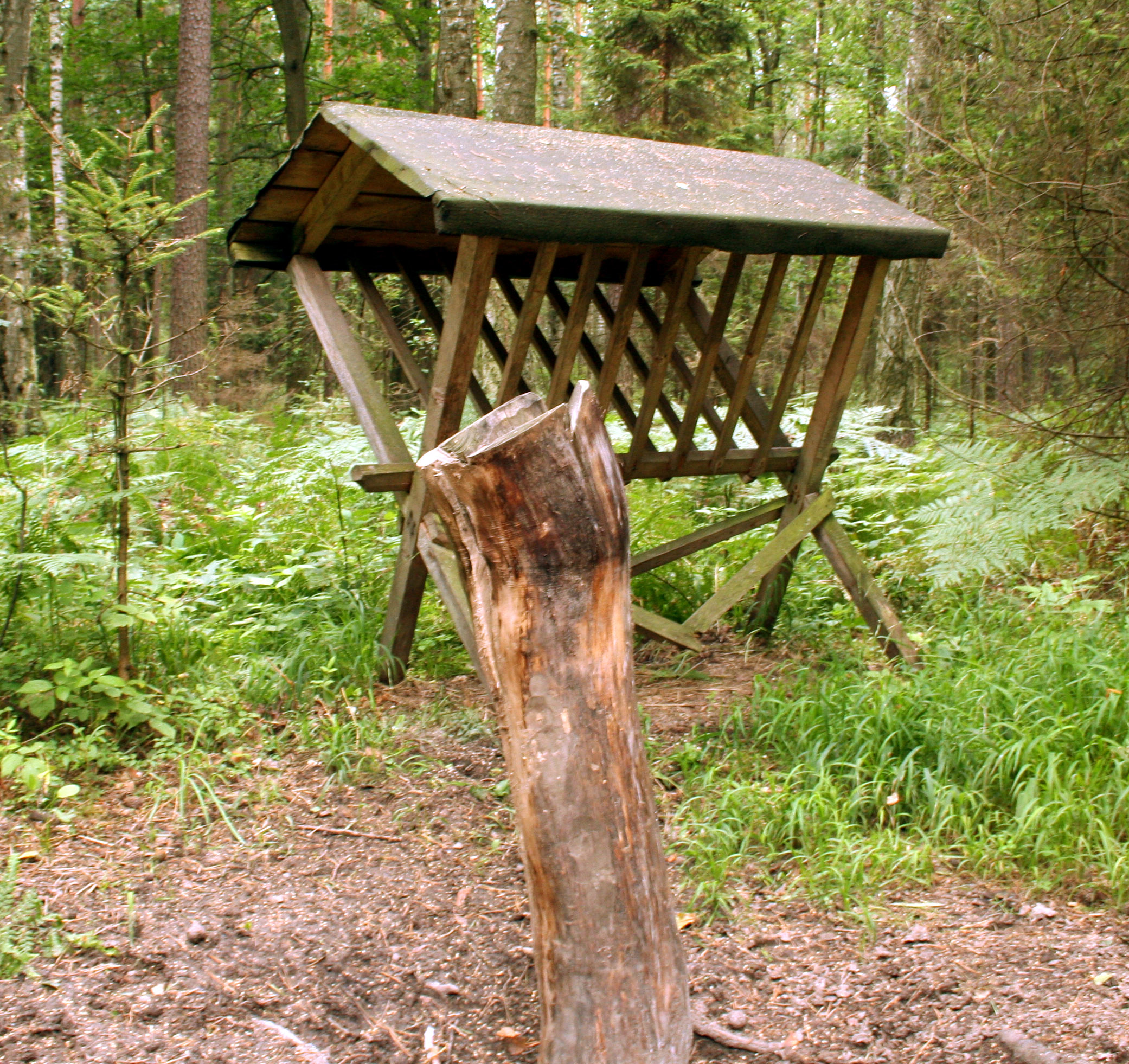 Lizawka, w tle paśnik